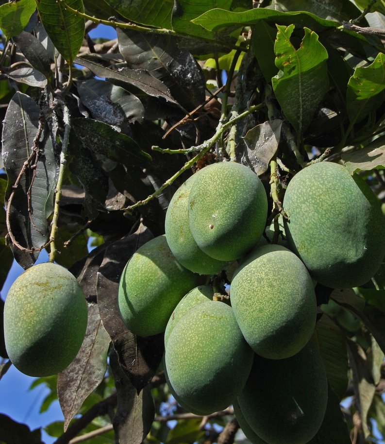 Mangga manalagi, a cultivar of mango, Mangifera indica, planted in Lumajang, East Java, Indonesia.